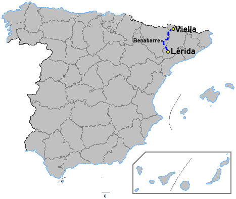 Mapa de la autovía